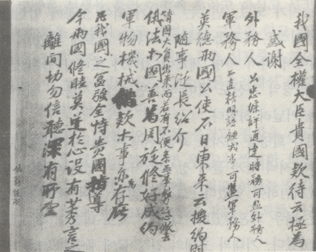 고종과 푸트 공사의 대담 내용, 기록 윤치호